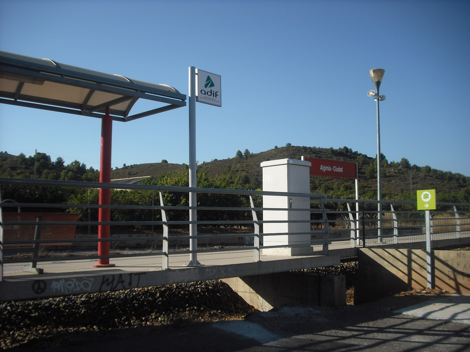 Estació d'Algímia d'Alfara.